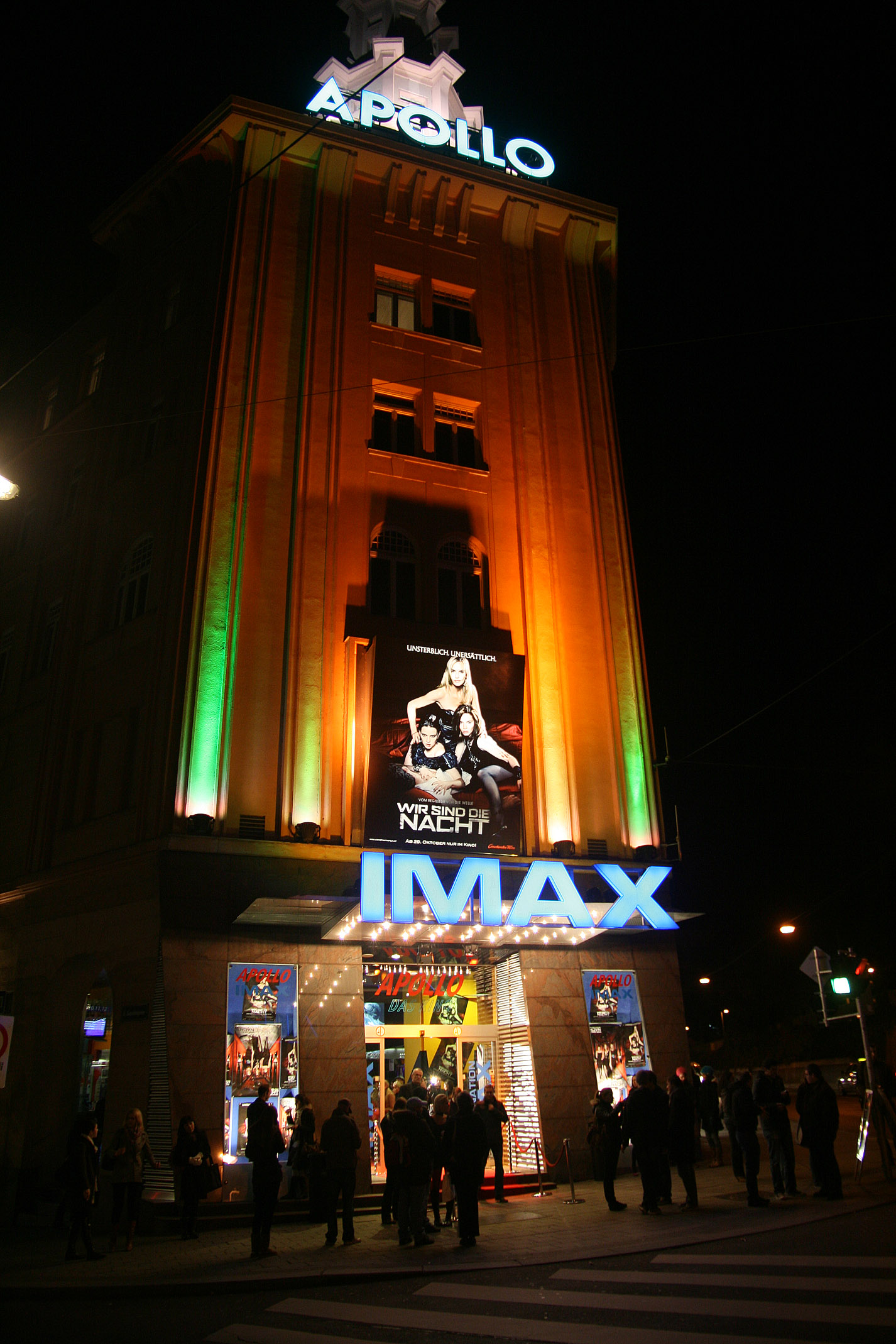 Das Apollo Kino in Wien am Abend der Österreichpremiere von Wir sind die Nacht.